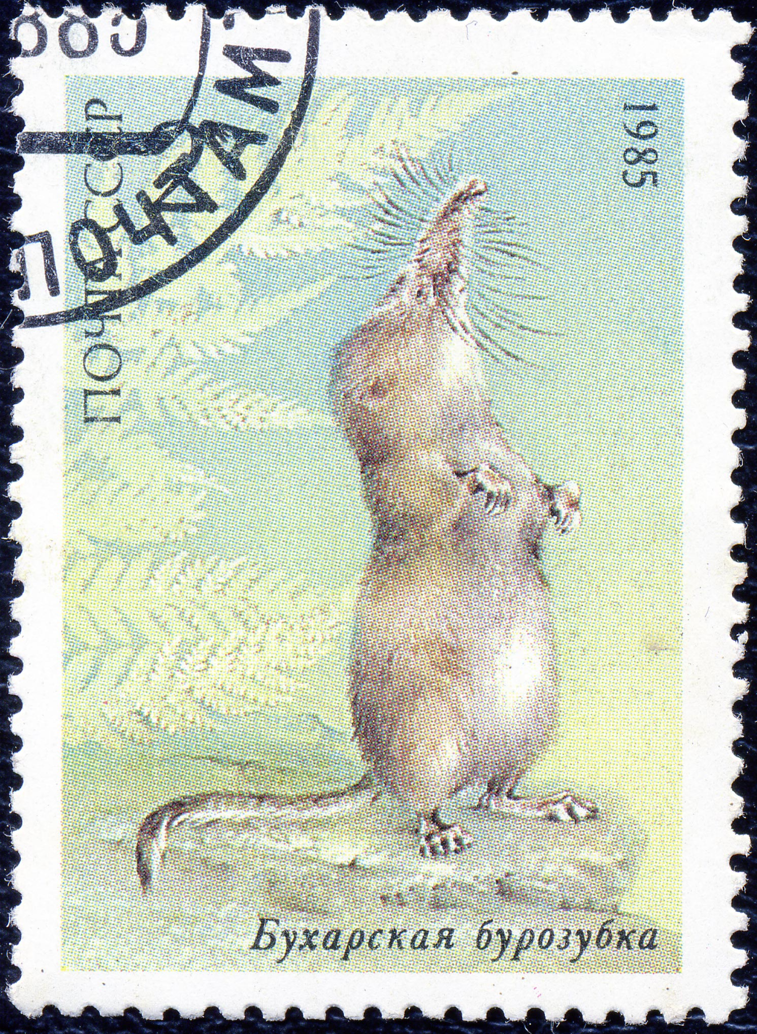 Sorex buchariensis